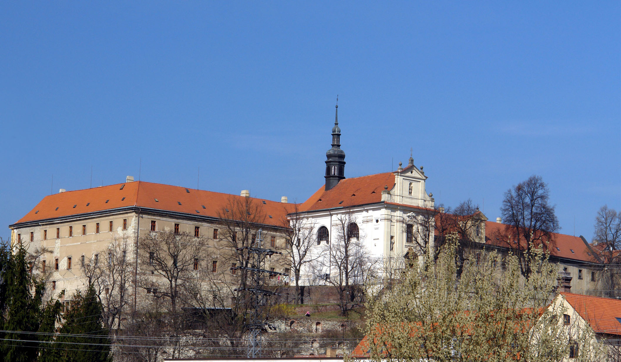 Rezidence jezuitská (Tuchoměřice), Tuchoměřice 1